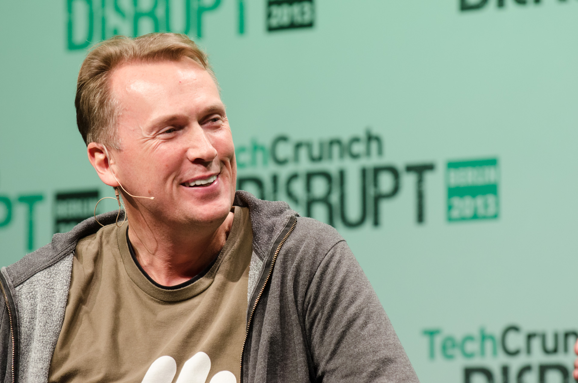 Marco Börries